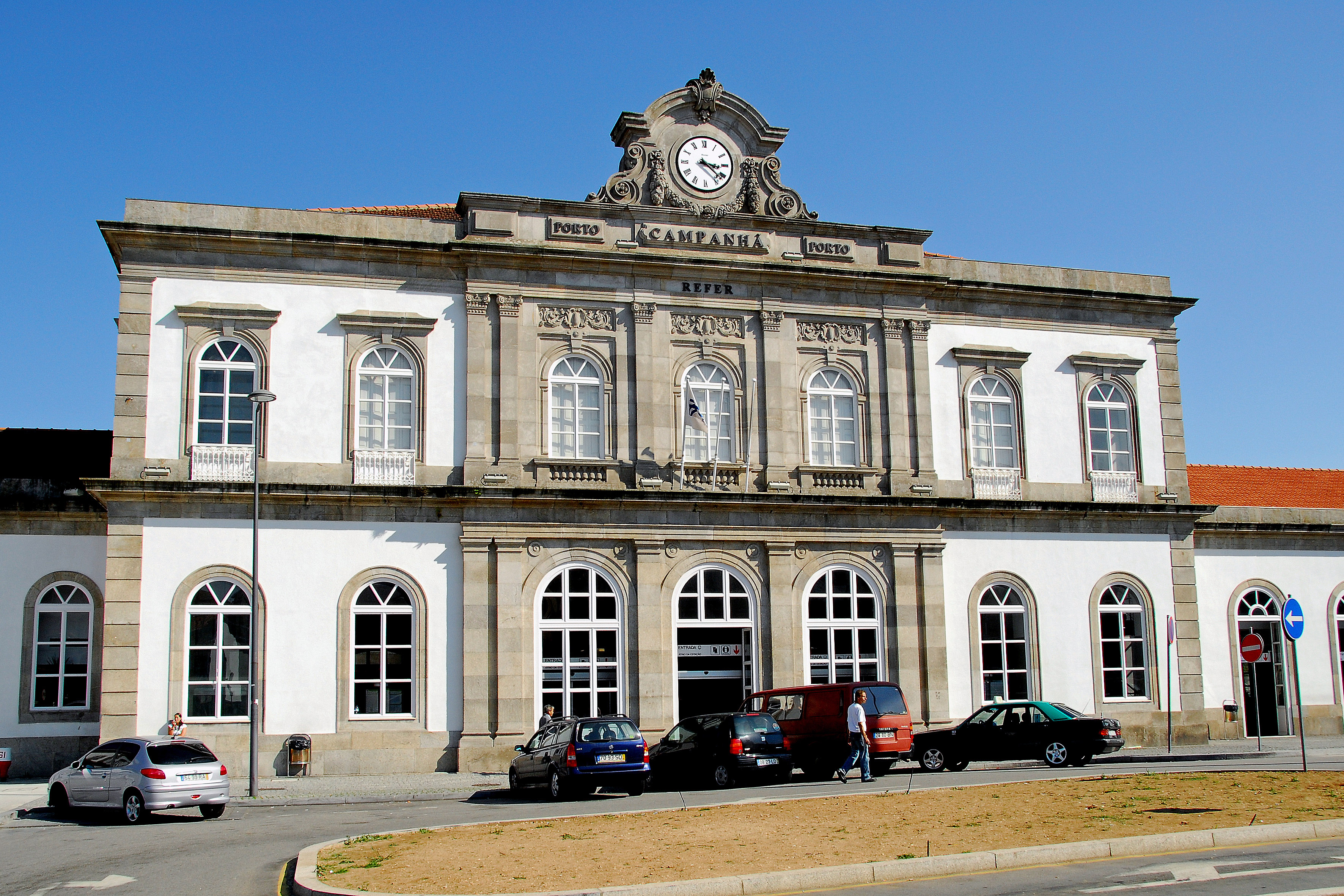 Campanhã-Estação Ferroviária de Campanhã This file was uploaded for Wiki Loves Monuments in Portugal with the unique identifier 97023030.